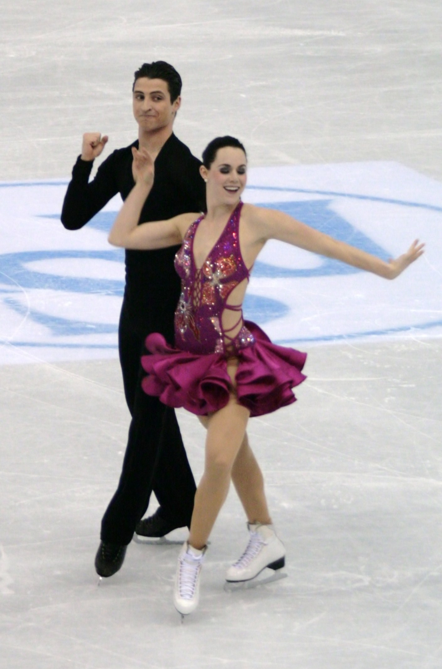 Тесса Вертью и Скотт Моир (Канада) на чемпионате мира по фигурному катанию 2012